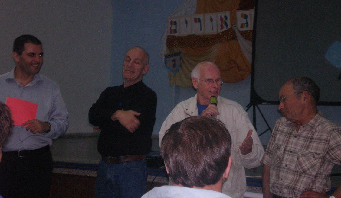 מחבריהם הבולטים של תשבצי היגיון בישראל. מימין: יורם הרועה, נדיב אבידן, אמנון בירמן, דקל בנו. צילם דוד שי בהגיונריה הראשונה, בי"ס חביב, ראשון לציון, 20.12.06.